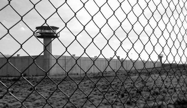 Cereso Pericles Namorado Urrutia, el penal de mediana seguridad mas grande de América Latina, donde se grabo el cortometraje Dia Festivo. FOTO: Rafa López